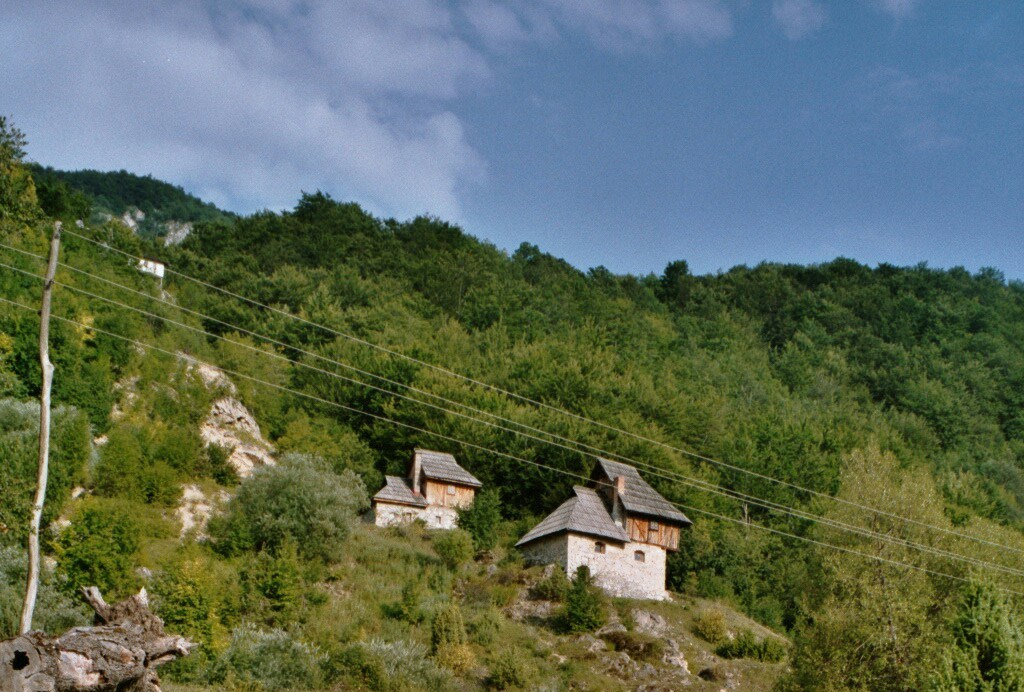 Häuser in Sopotnica